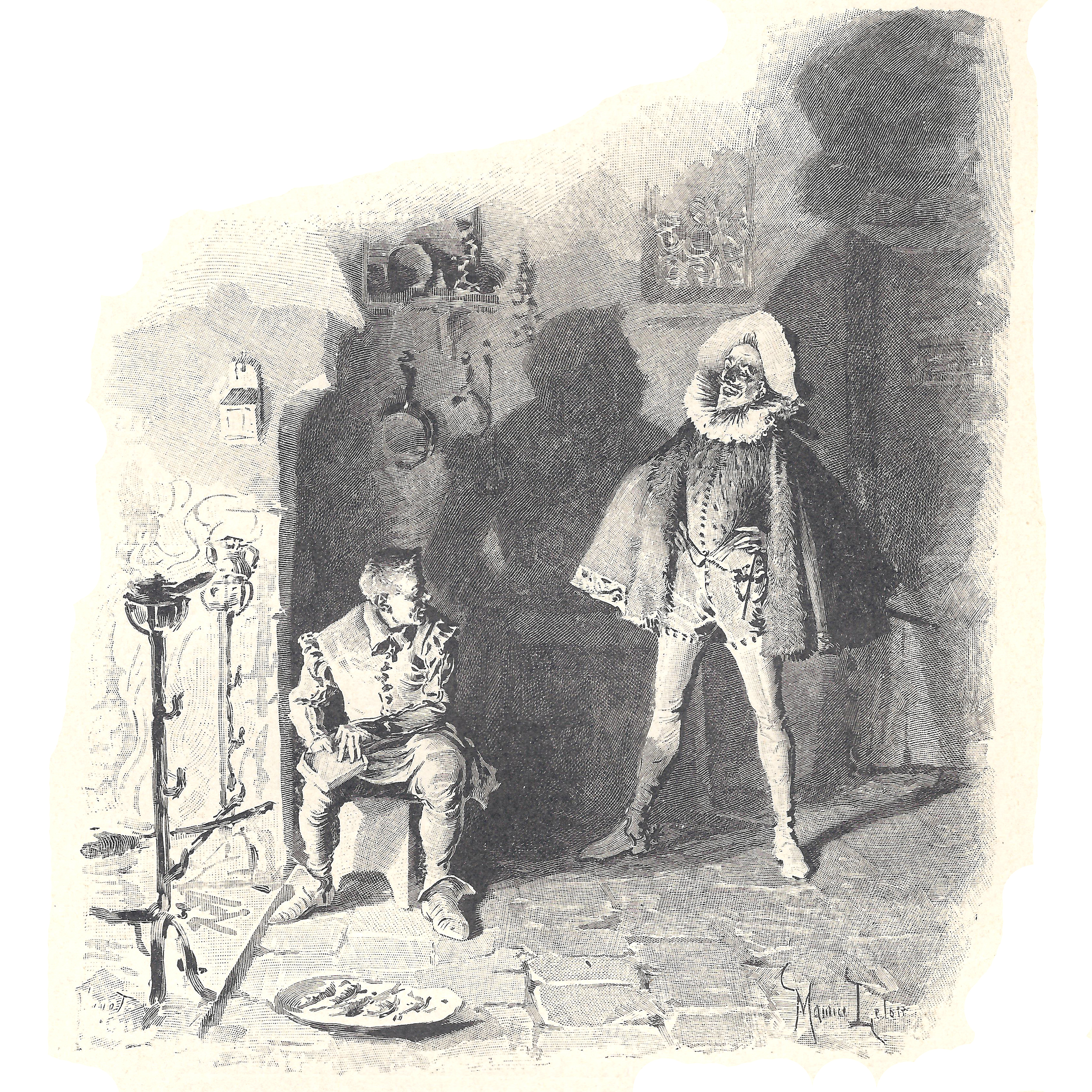 composition de Maurice Leloir et gravure sur bois de Jules Huyot se trouvant p. 224 : Maître Bonhomet leva la tête.